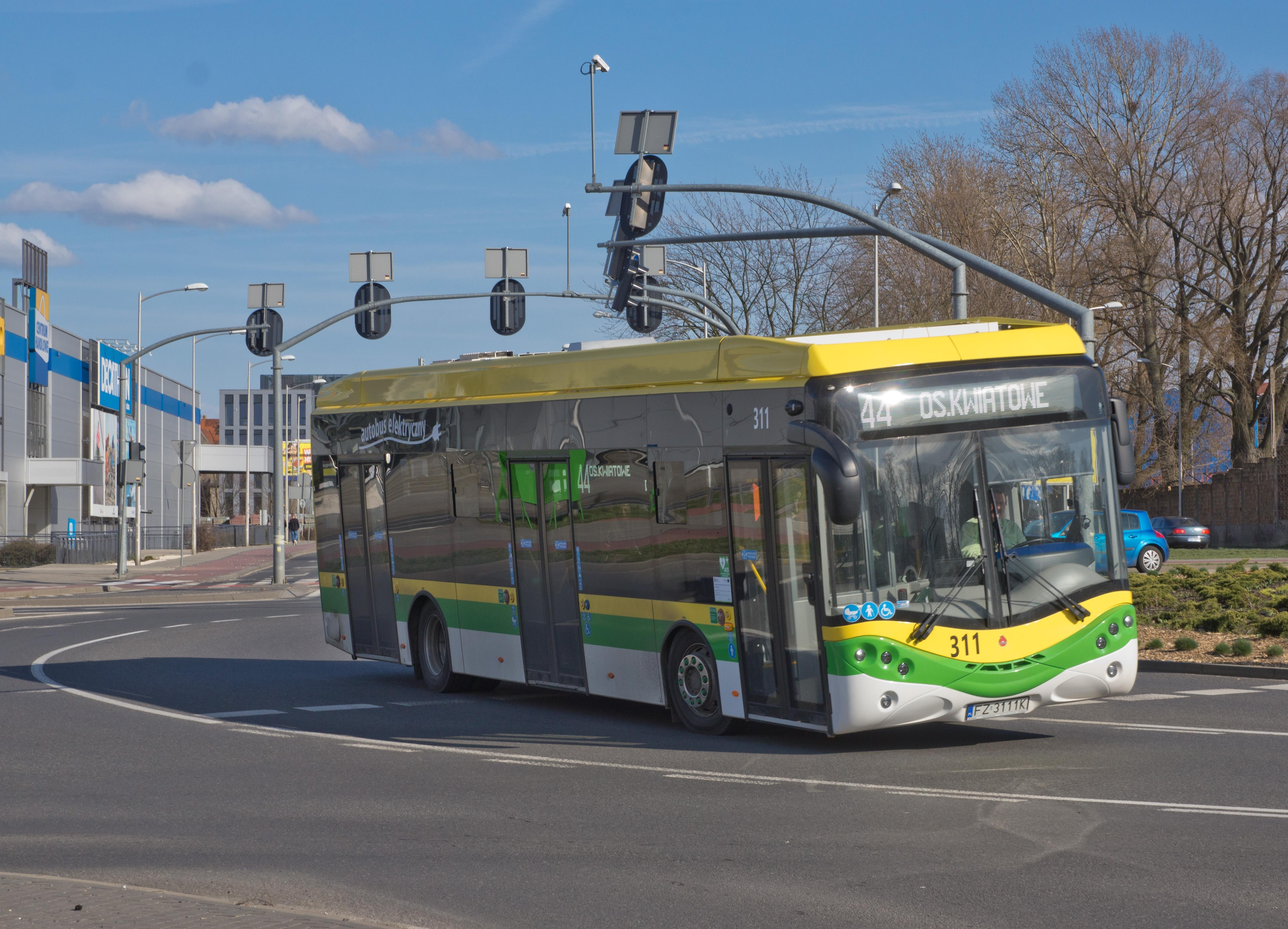 Zielona góra mzk bus